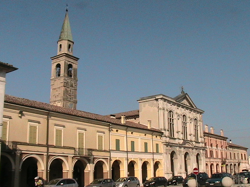 Pomponesco (9) - La chiesa e i portici della piazza